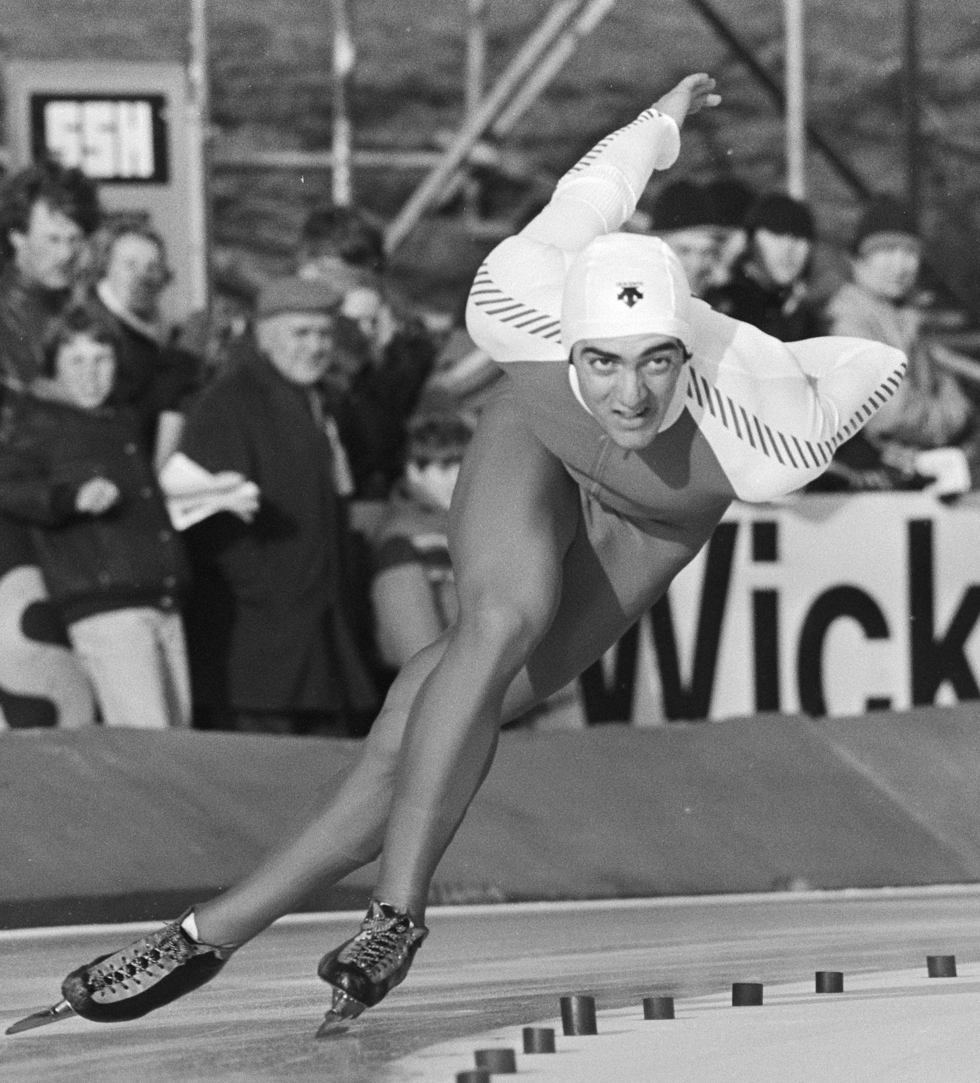 WK Sprint schaatsen in Alkmaar. Boucher in aktie.